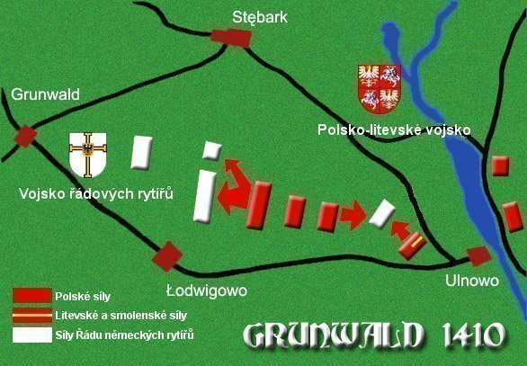 Protiútok litevských vojsk v závěrečné fázi Grunwaldské bitvy 1410